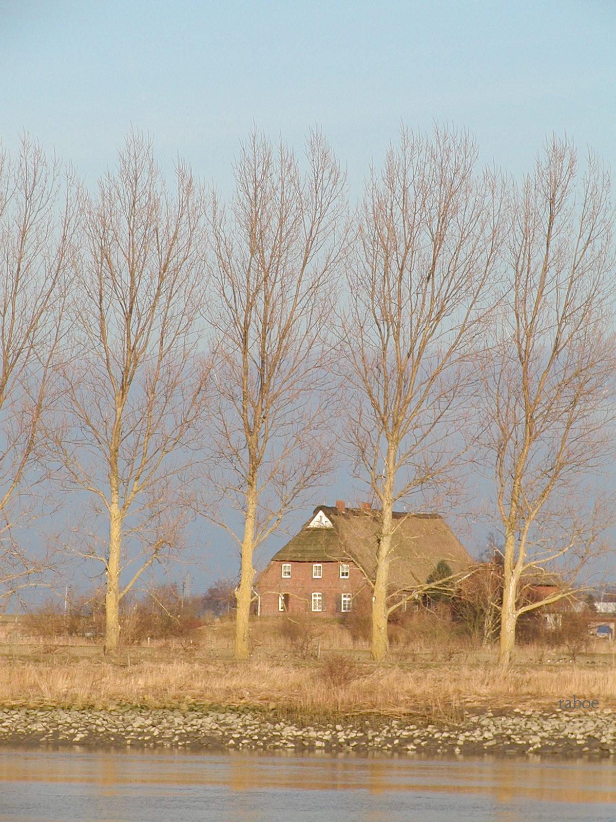 Balje, ein Bauernhaus in der Oste